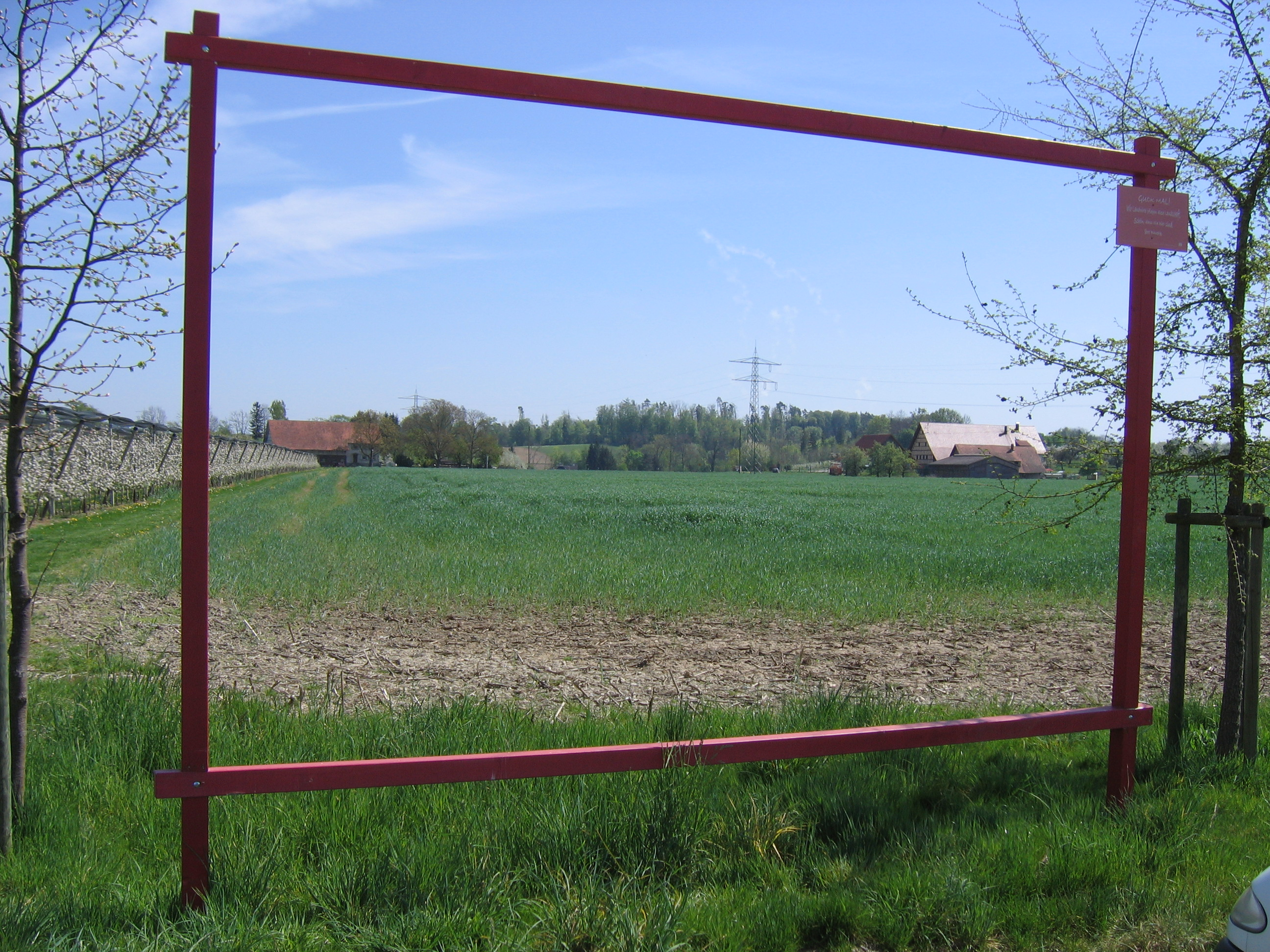 Deutschland - Baden-Württemberg - Bodenseekreis - Oberteuringen: Guck-mal-Rahmen bei Unterteuringen